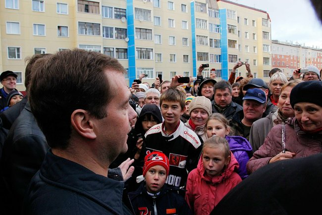 С жителями города.